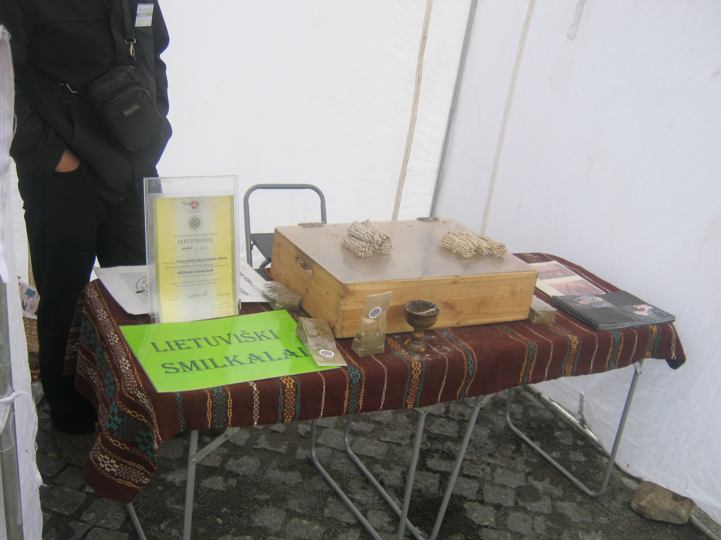 AgroBalt 2012